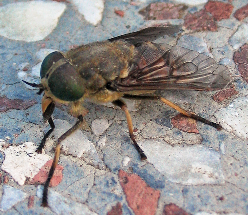 Beschreibung: Gemeine Viehbremse (Tabanus_bromius) Fotograf: Darkone, 2. Juli 2005